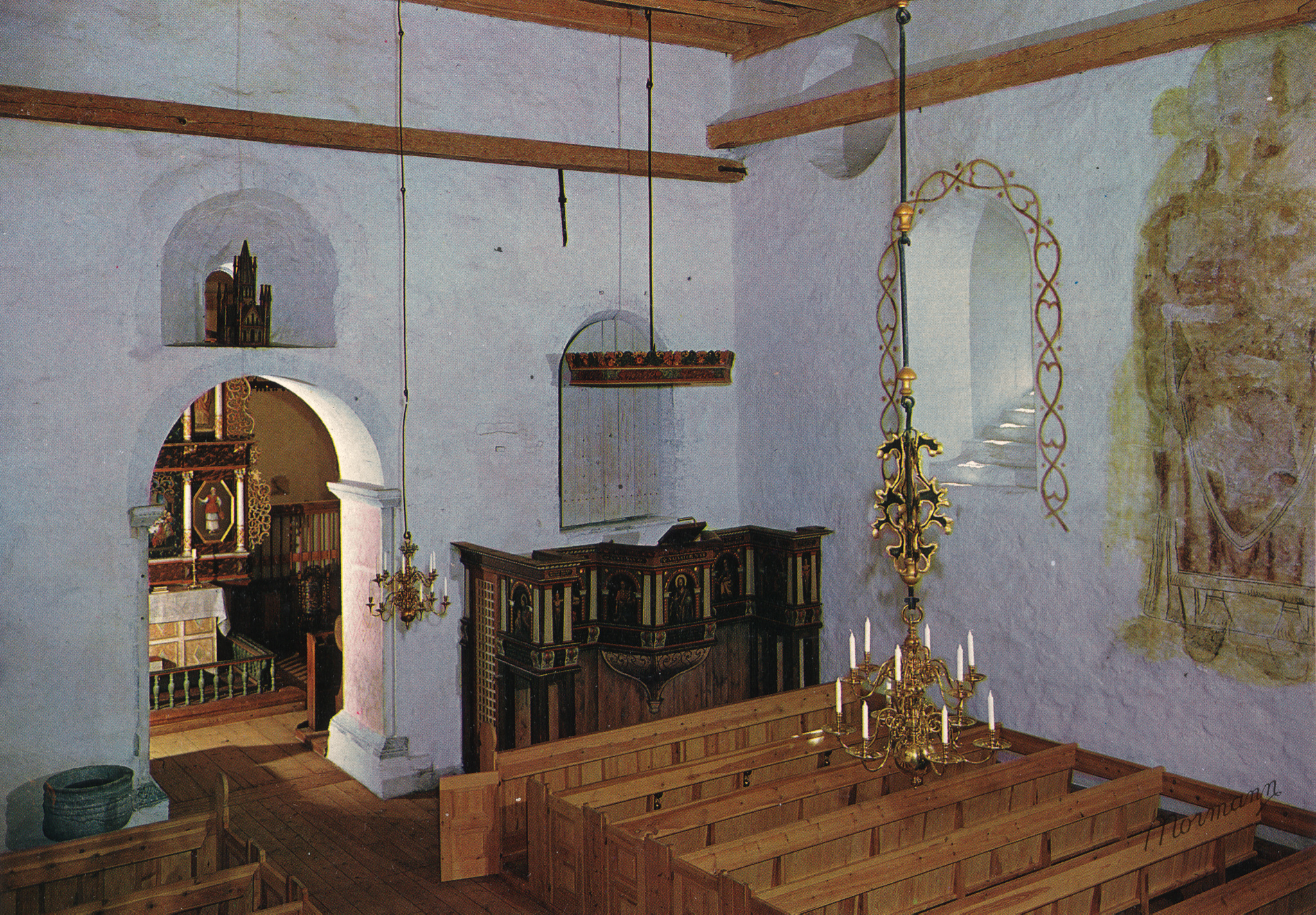 Interiør i Kinsarvik kirke. Ukjent fotograf, fra Riksantikvarens Kulturminnebilder.no